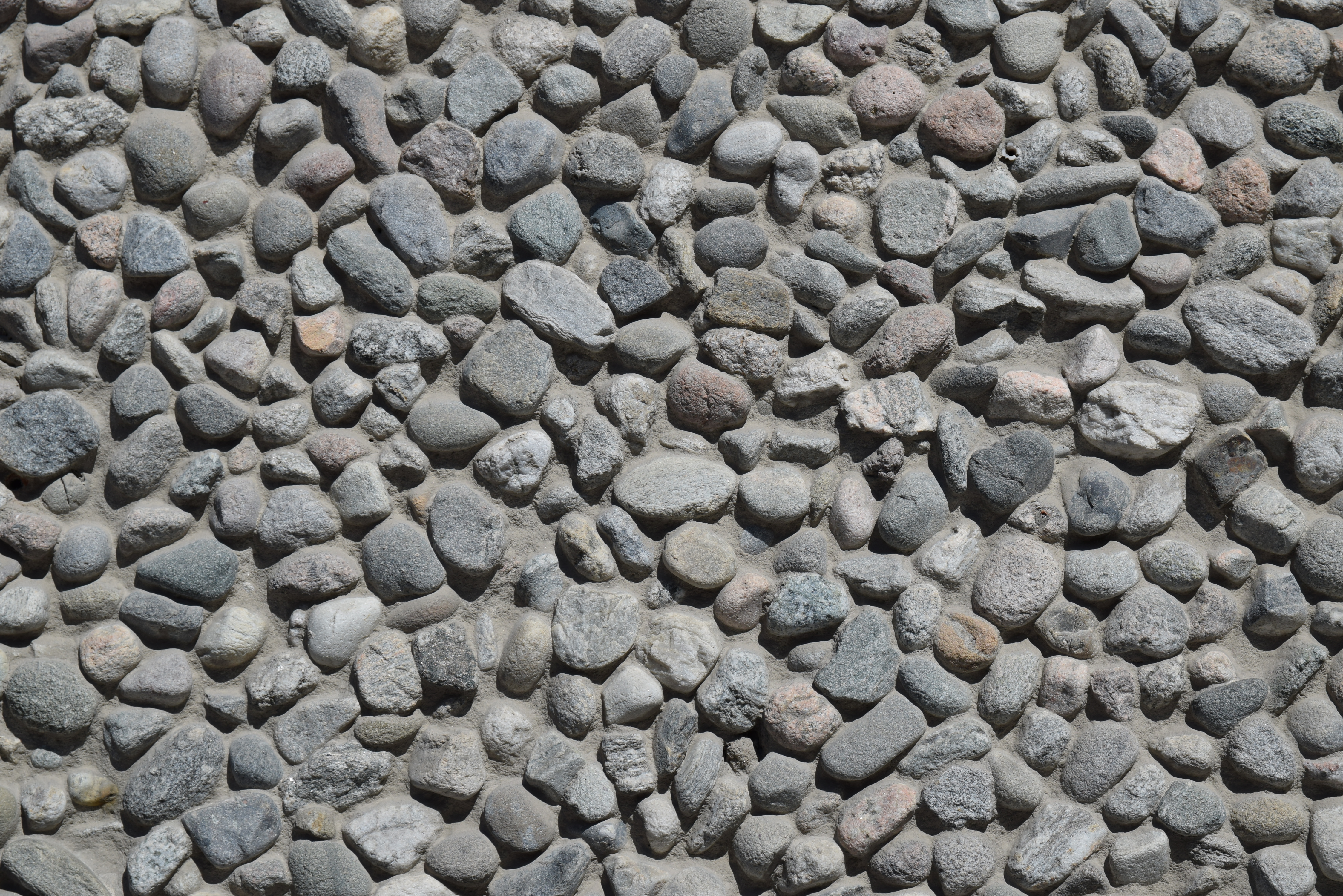 Y-blokken / Y-blokka, Regjeringskvartalet, detalj av fasade i naturbetong, kortvegg mot Akersgata